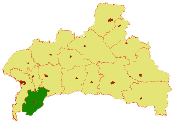 Malarycký rajón v rámci Brestské oblasti